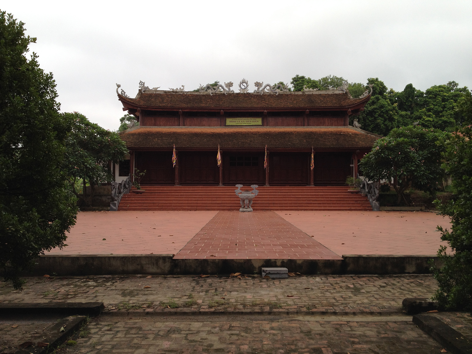 Đình cả xã Tiên Kiên, huyện Lâm Thao, tỉnh Phú Thọ, Việt Nam.